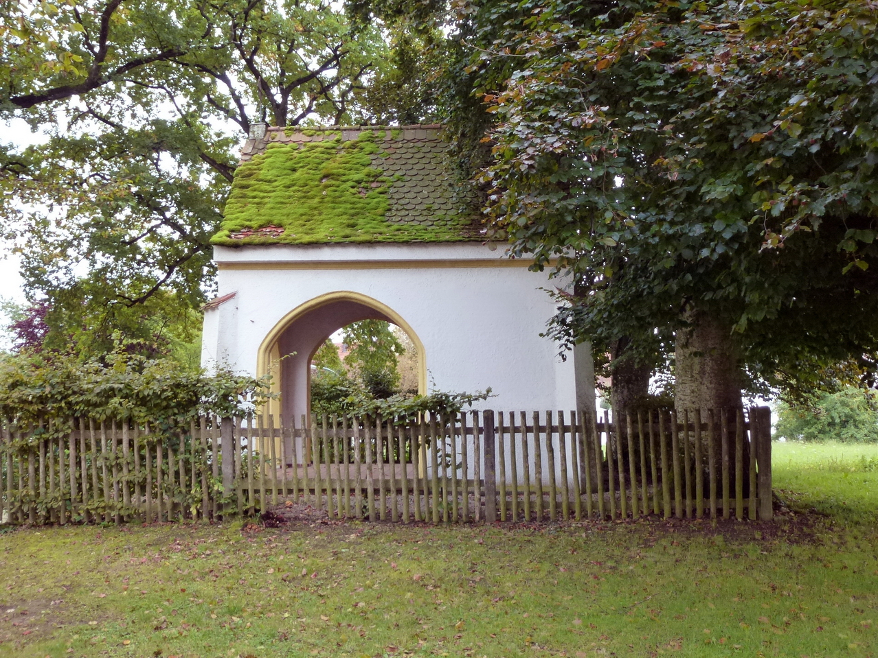 Ansicht von NordenThis is a photograph of an architectural monument.